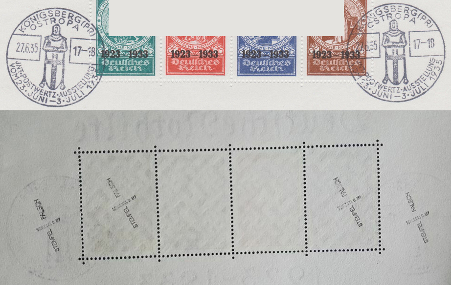 Falschstempel auf einem echten Block der Mi.Nr. Block 2, 508-511